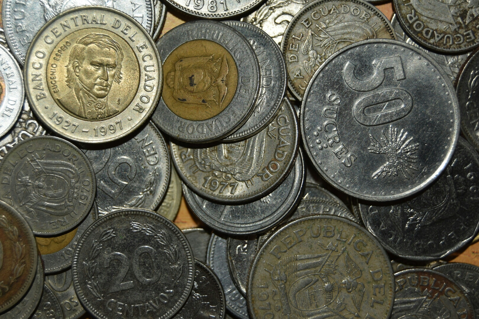 Colección privada PJA